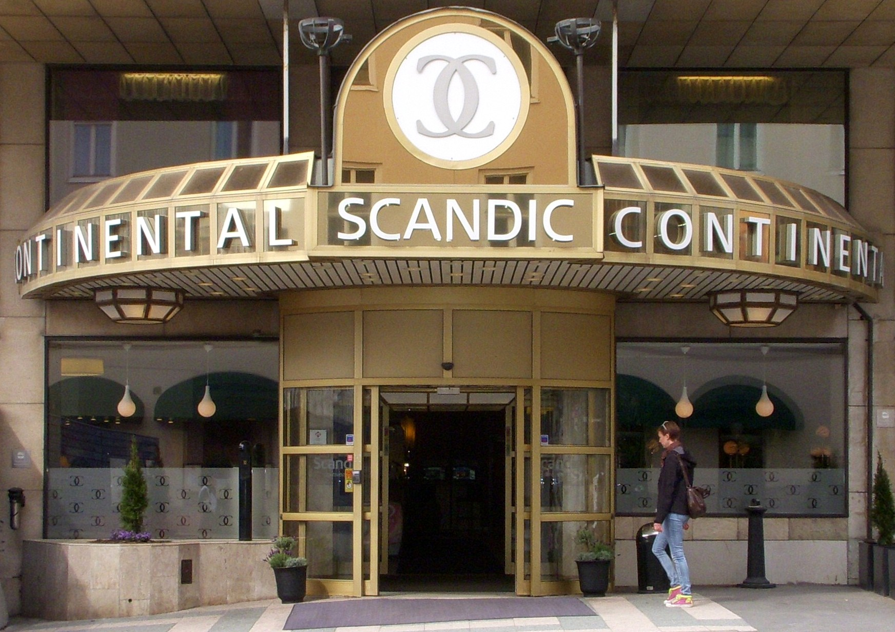 Hotell Scandic Continental i Stockholn, entré